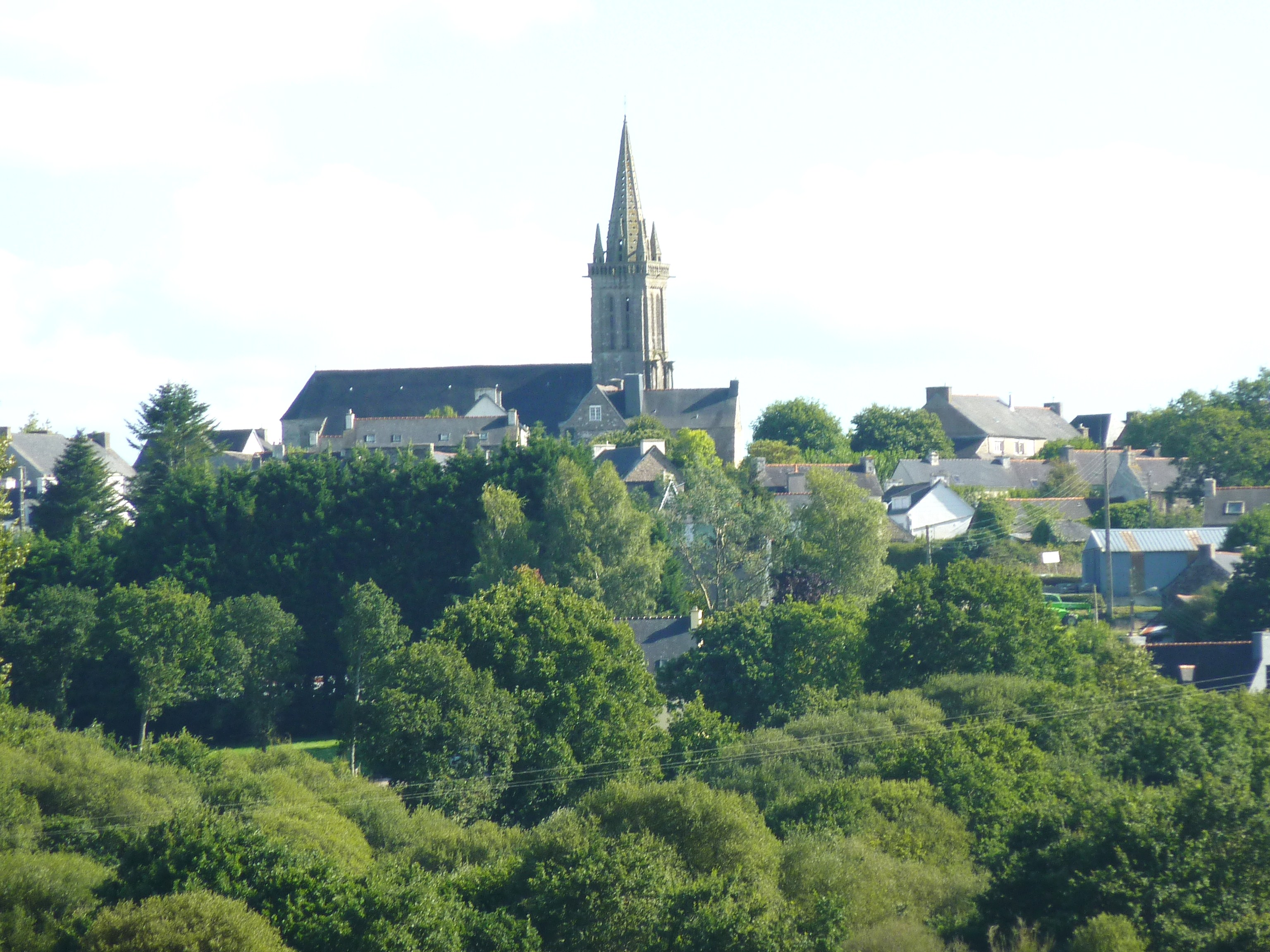 Poullaouen vu de "La Mine"